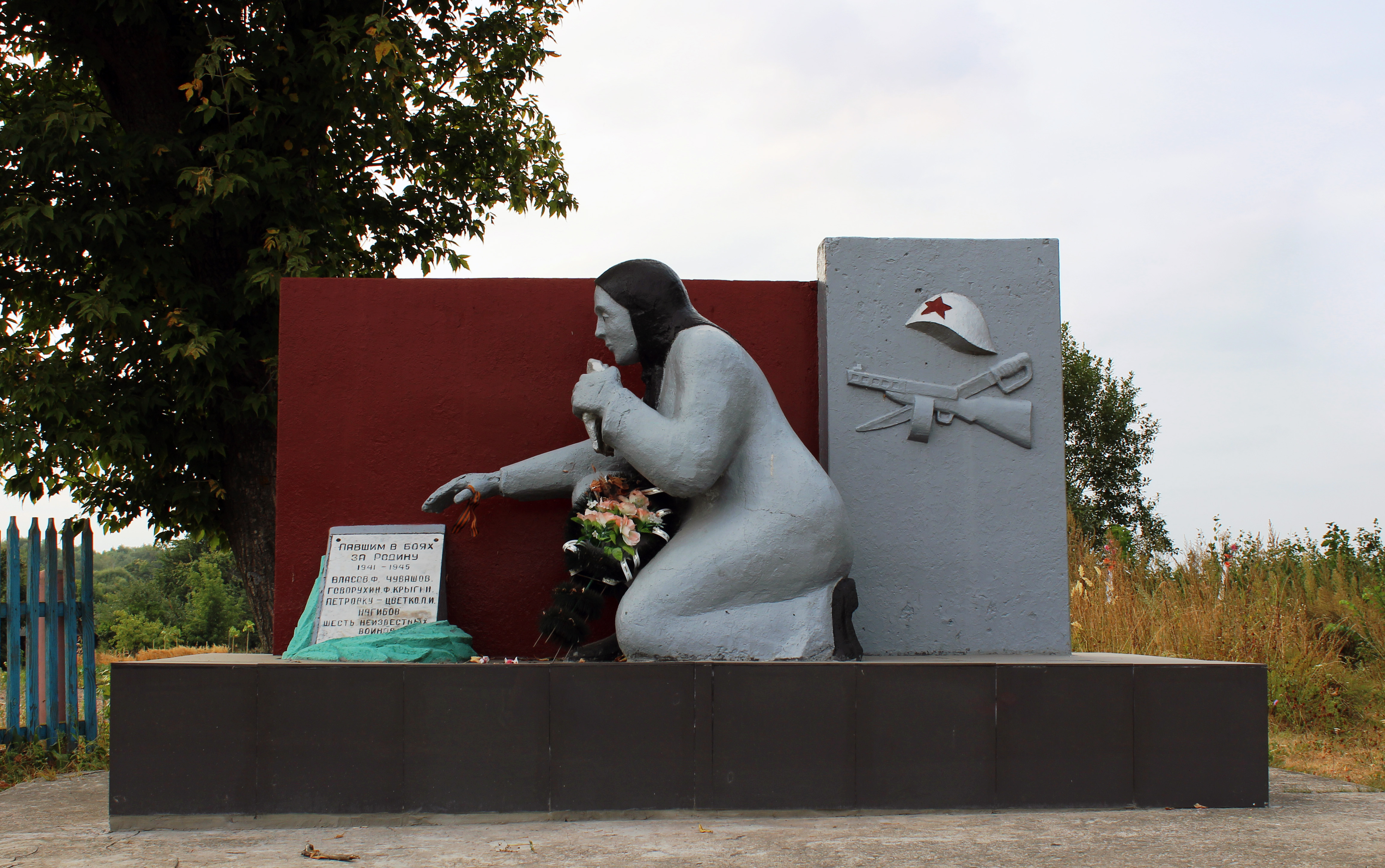 Братская могила 12 советских воинов, погибших в боях с немецко-фашистскими захватчиками: кладбище, Малая Топаль, Клинцовский район, Брянская область